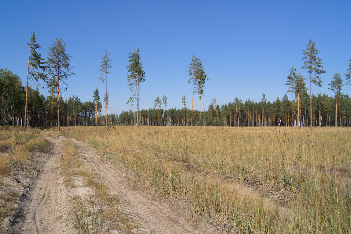 Последствия масштабных вырубок леса в заказнике "Муромский"